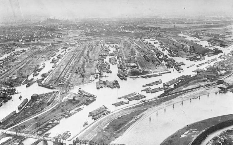 Zur Arbeitslosigkeit verbannt! Blick auf den grössten Binnenhafen der Welt in Duisburg, mit der durch die große Weltwirtschaftskrise stillgelegten Schiffahrt.